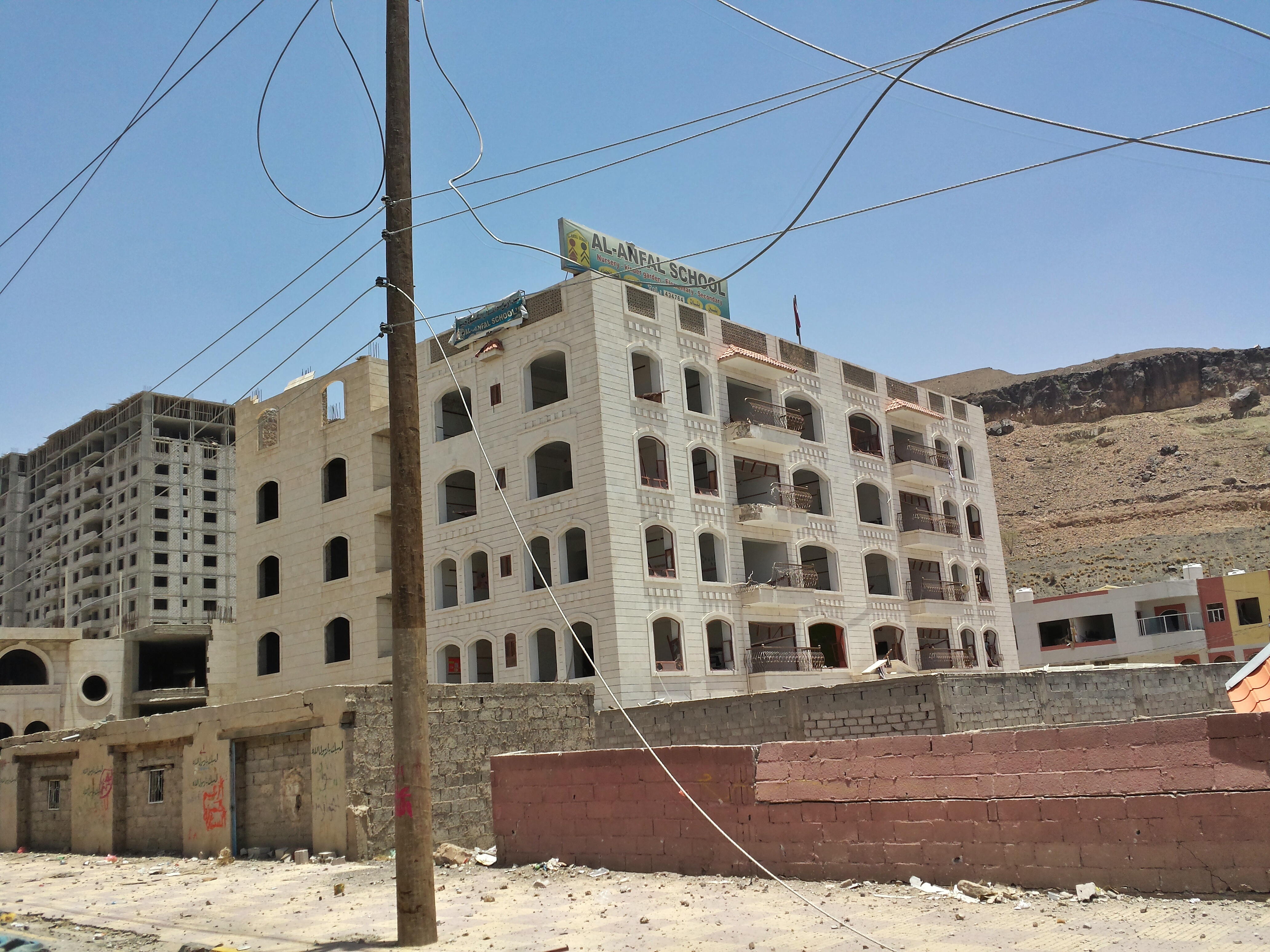 دمار واسع في الأحياء السكنية المحيطة بجبل فج عطان الذي تعرض لضربة جوية من طائرات حربية من عملية عاصفة الحزم.